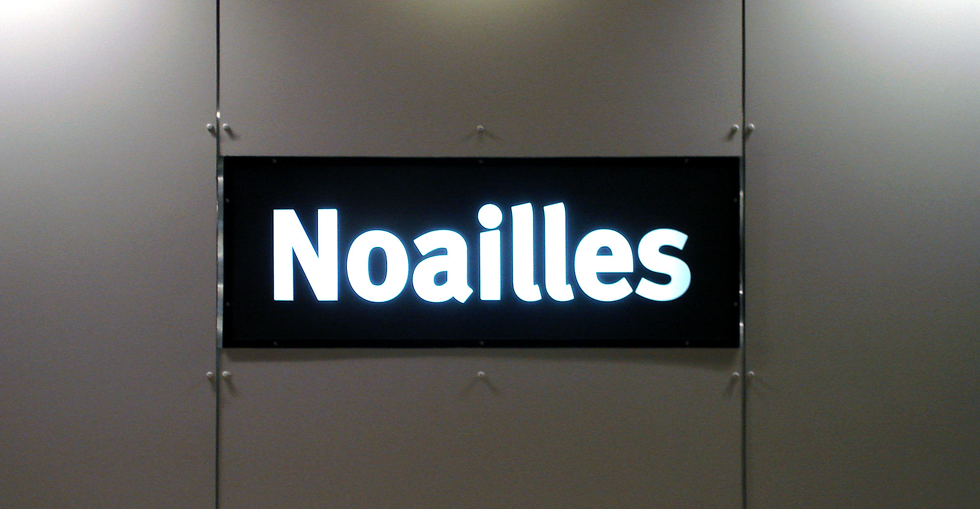 Panneau de la station Noailles de la ligne 1 du tramway de Marseille, France.